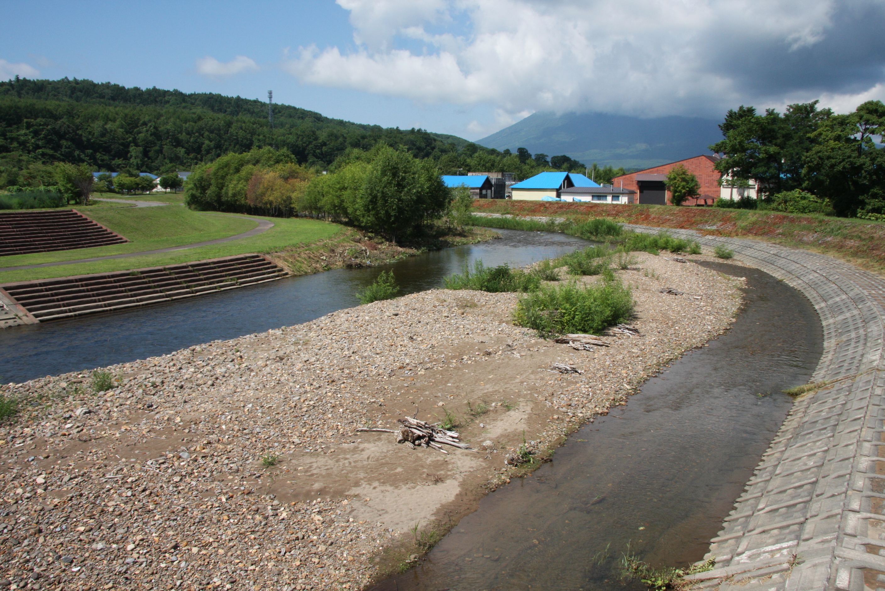 喜茂別川 喜茂別橋より下流を望む